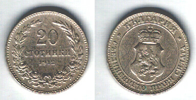 Bulgaria - 20 stotinki